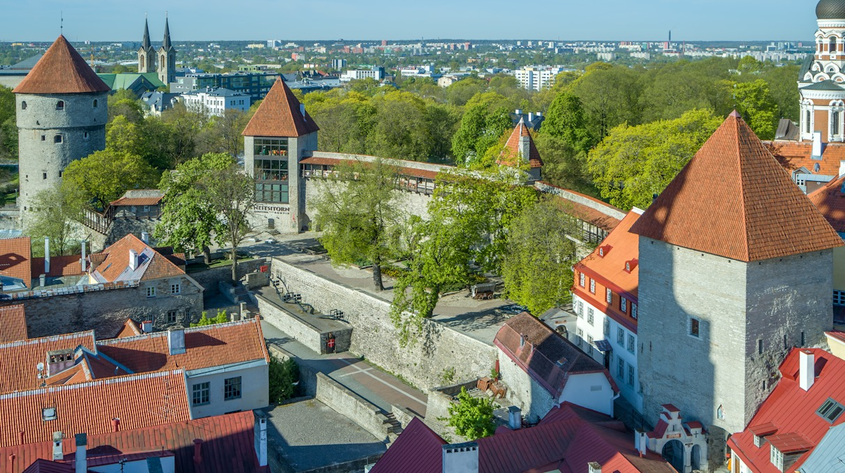 Kiek in de Köki Kindlustustemuuseum